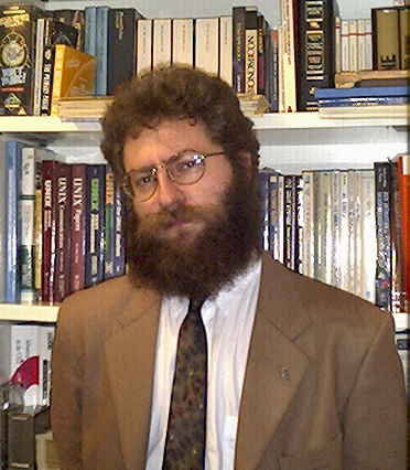 Corrado Giustozzi. Immagine inviata da lui stesso.